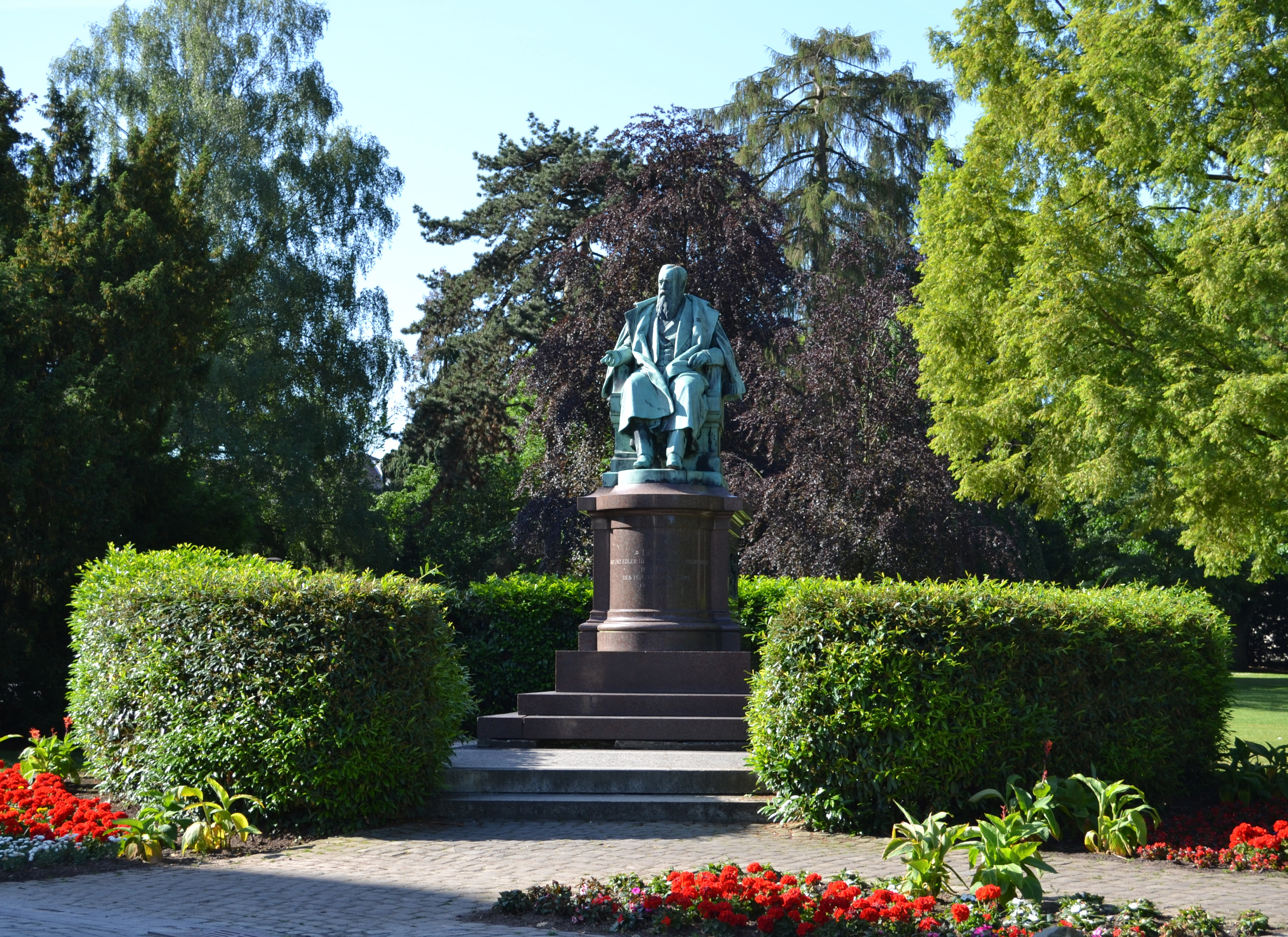 Ernst zur Lippe-Biesterfeld, Denkmal von Heinrich Wefing im Schlosspark Detmold